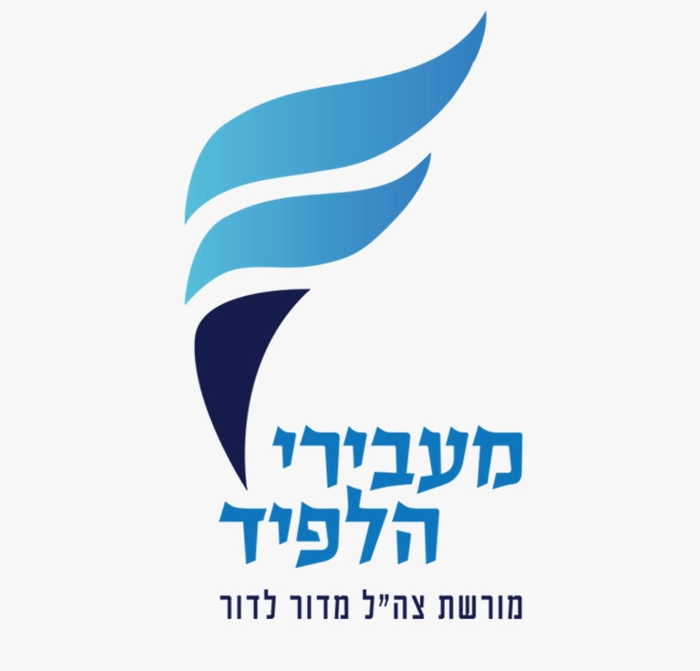 סמליל עמותת מעבירי הלפיד להנחלת מורשת צה"ל